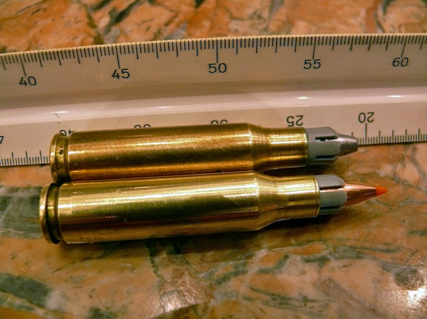 Proyectil subcallibrado de alta velocidad